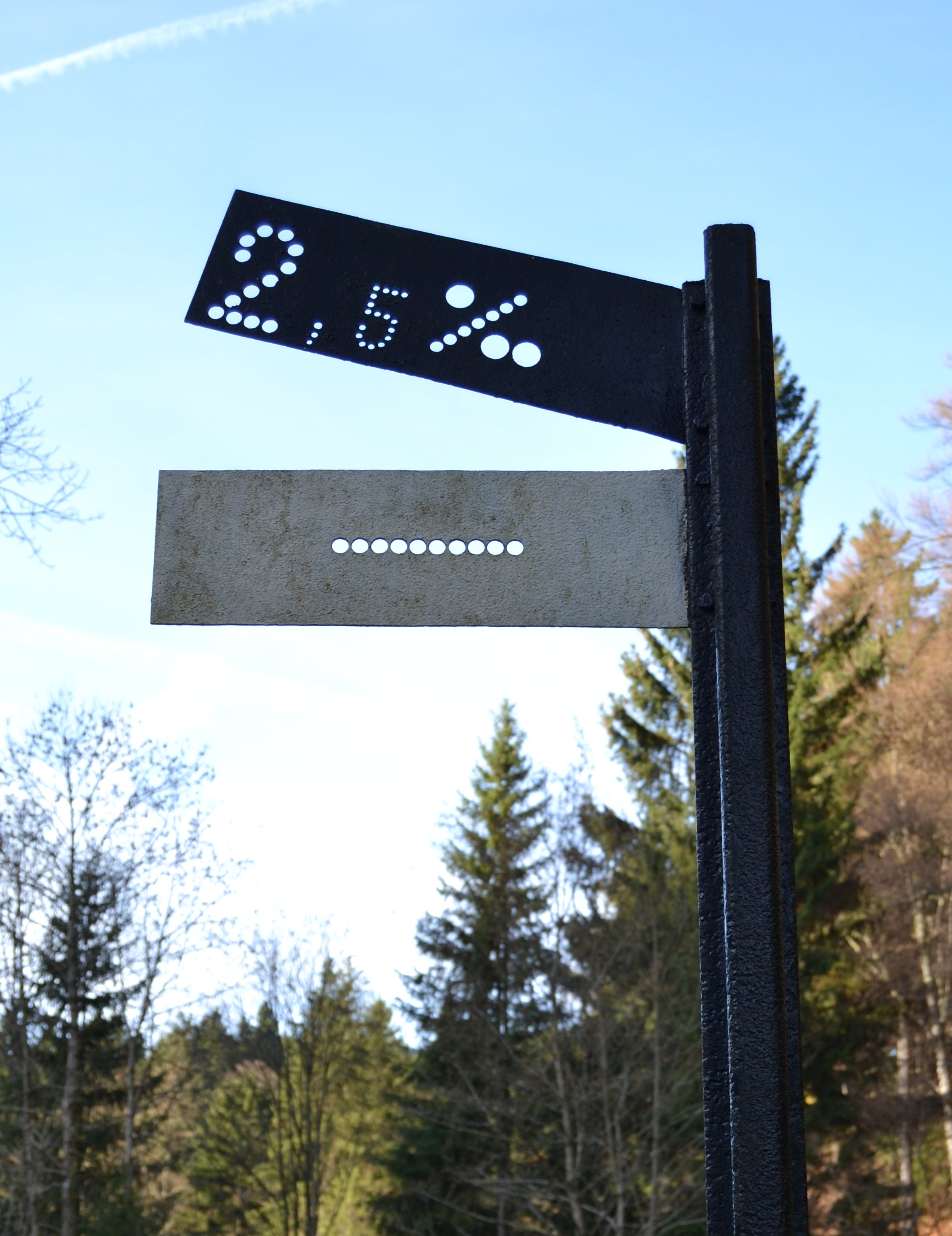 Restaurierter Neigungsanzeiger an der ehemaligen Bahnstrecke Walkenried-Braunlage, Standort am östlichen Ausgang des Bahnhofs Stöberhai.